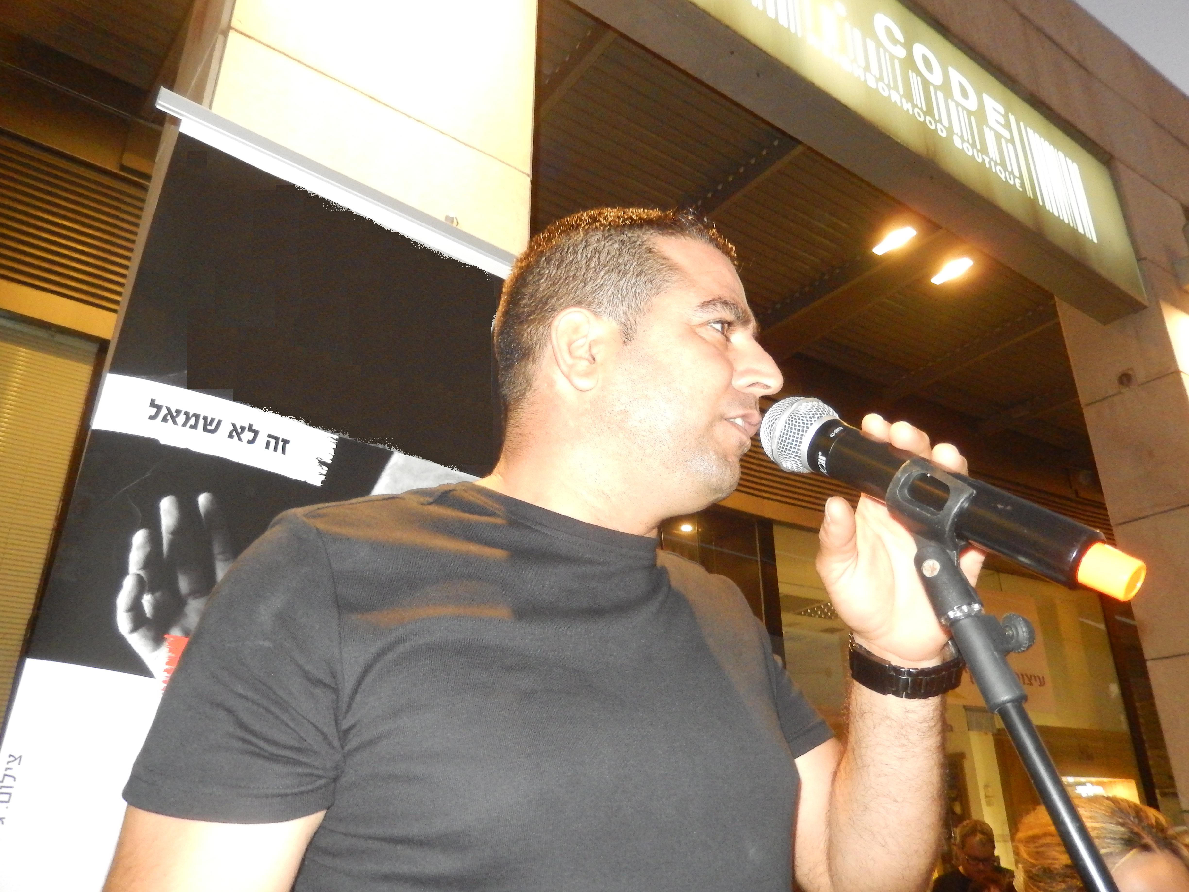 מני נפתלי בהפגנה כנגד היועץ המשפטי לממשלה